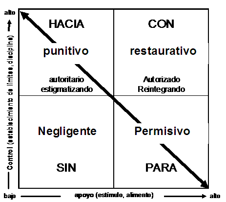 Traducido por Gilda B. Plazas G. de Nan Ellin Restorative Urbanism: From Sustainability to Prosperity Sustainable Urbanism and Beyond Ed., Tigris Haas October 12, 2010 Revised October 24, 2010